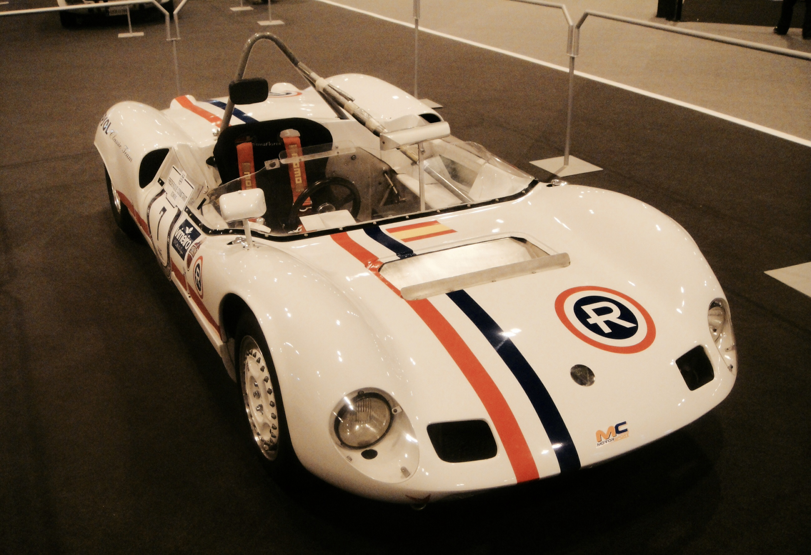 Elva BMW MK-7 en Madrid Motor Days 2014.